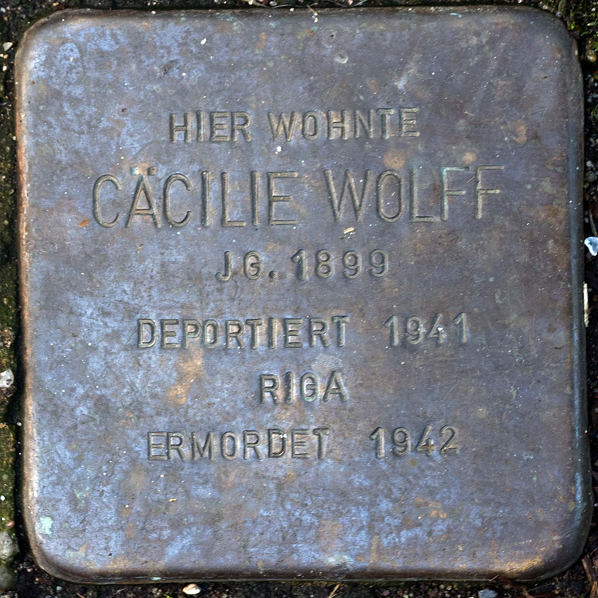 Stolperstein für Wolff Caecilie